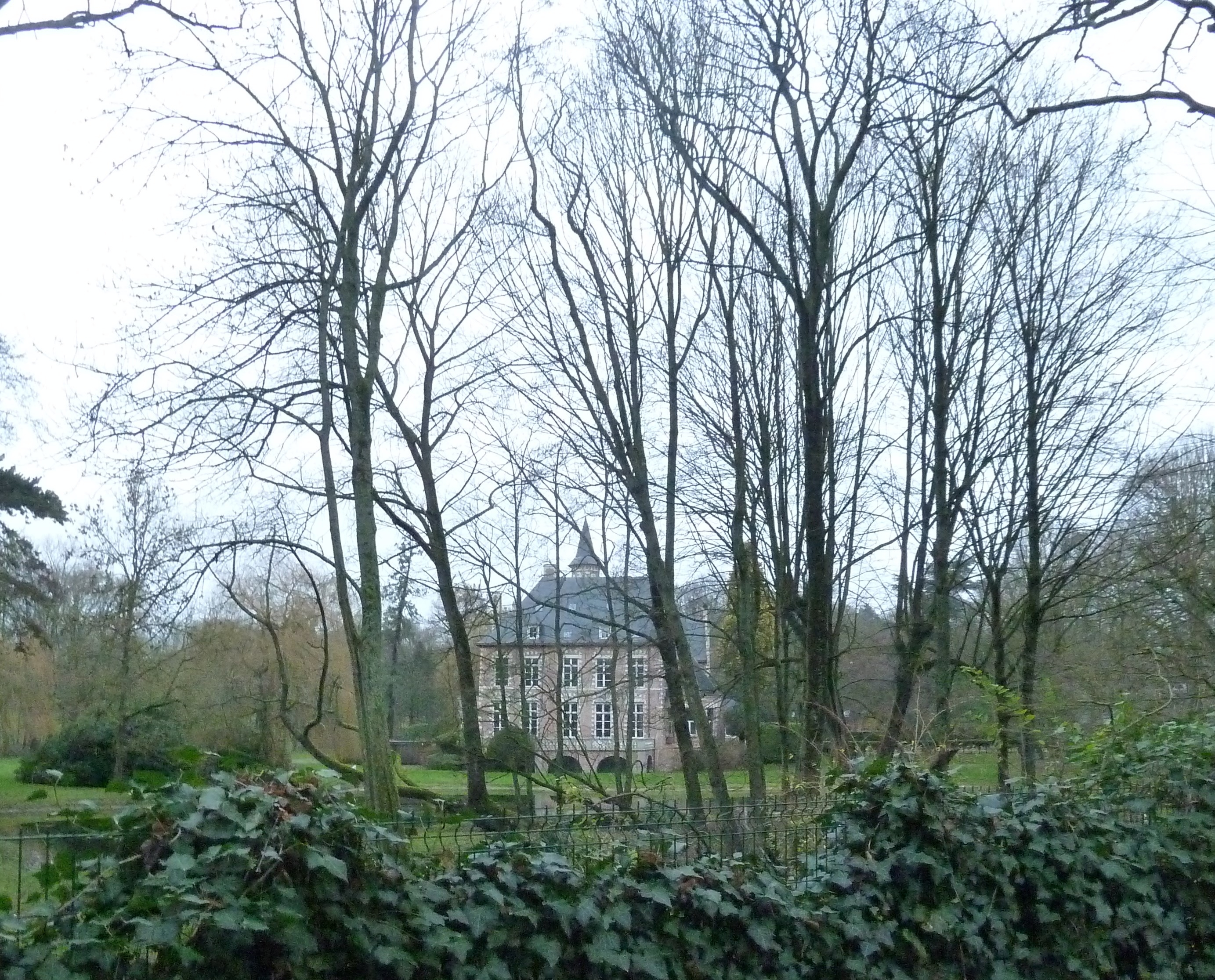 Château de la Fontaine à Croix, Nord .- France .